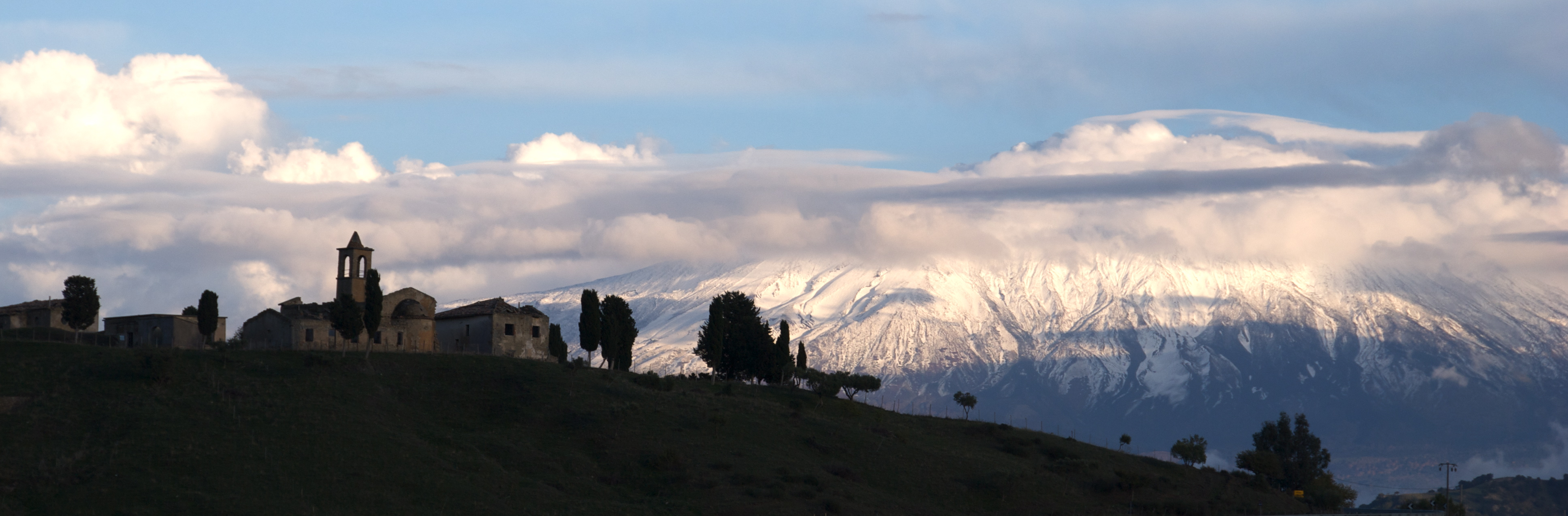 Cesarò- Borgo Giuliano e l'Etna